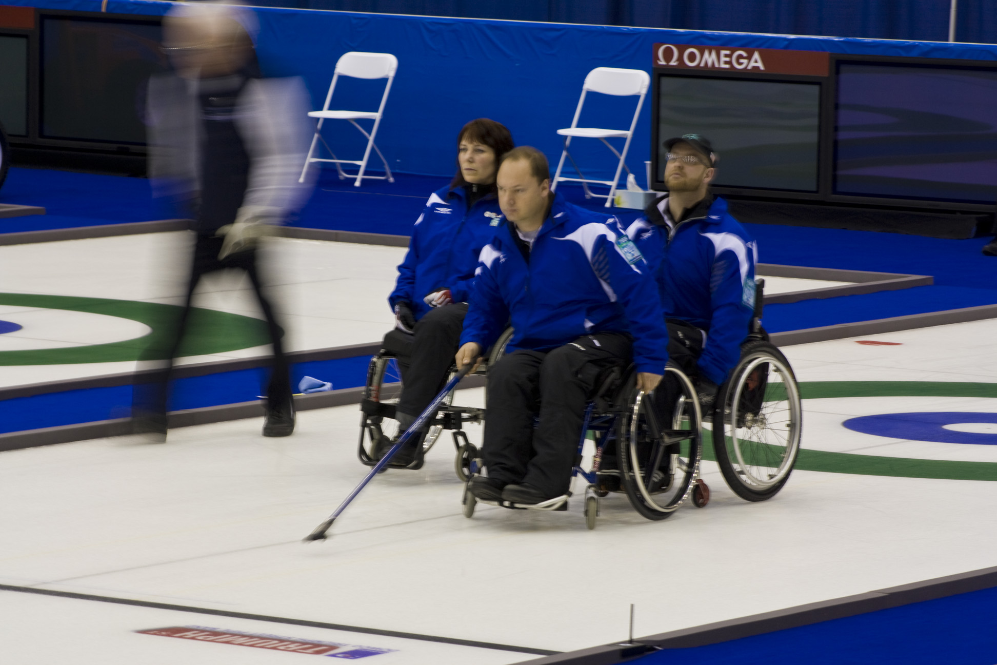 Team Norway - Anne Mette Samdal, Jostein Stordahl and Geir Arne Skogstad (l to r)